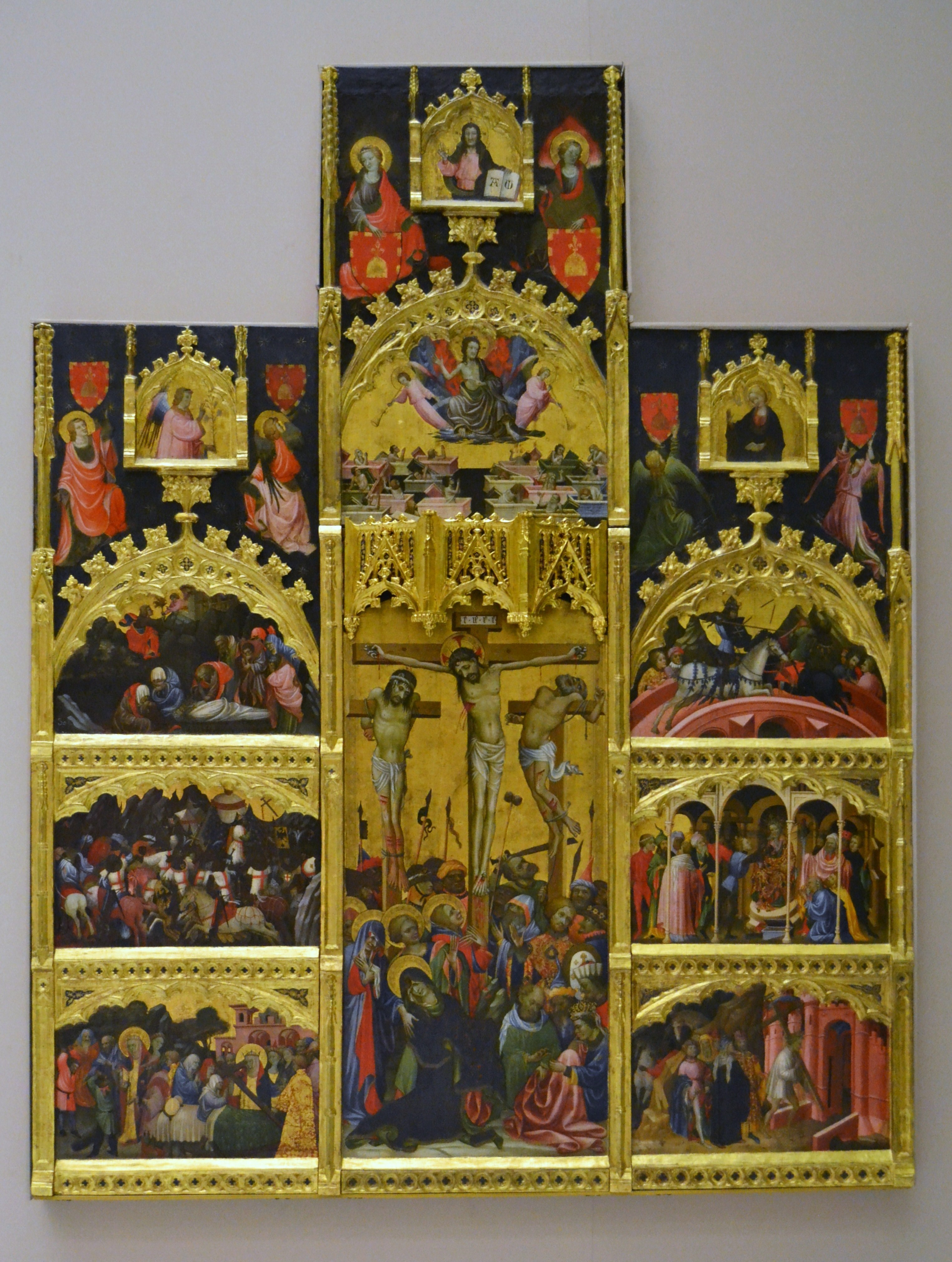 Esta obra, conocida como el Retablo de la Santa Cruz, fue realizada por Miguel Alcañiz hacia 1410.